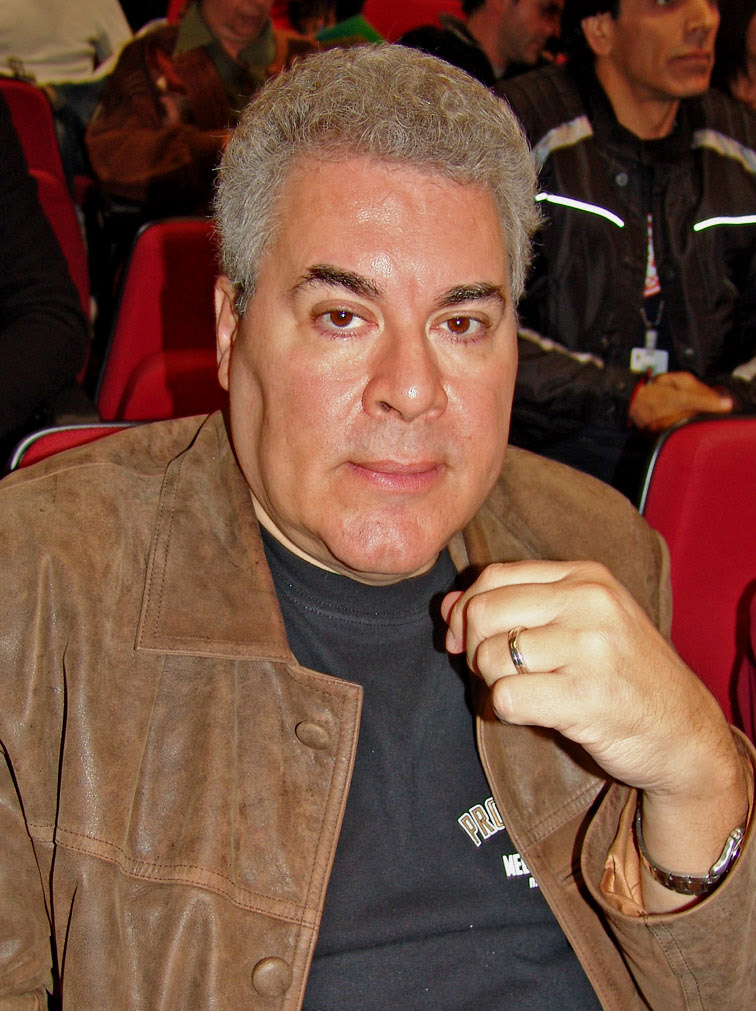 O ator brasileiro Cláudio Curi.CRISTAL (7)